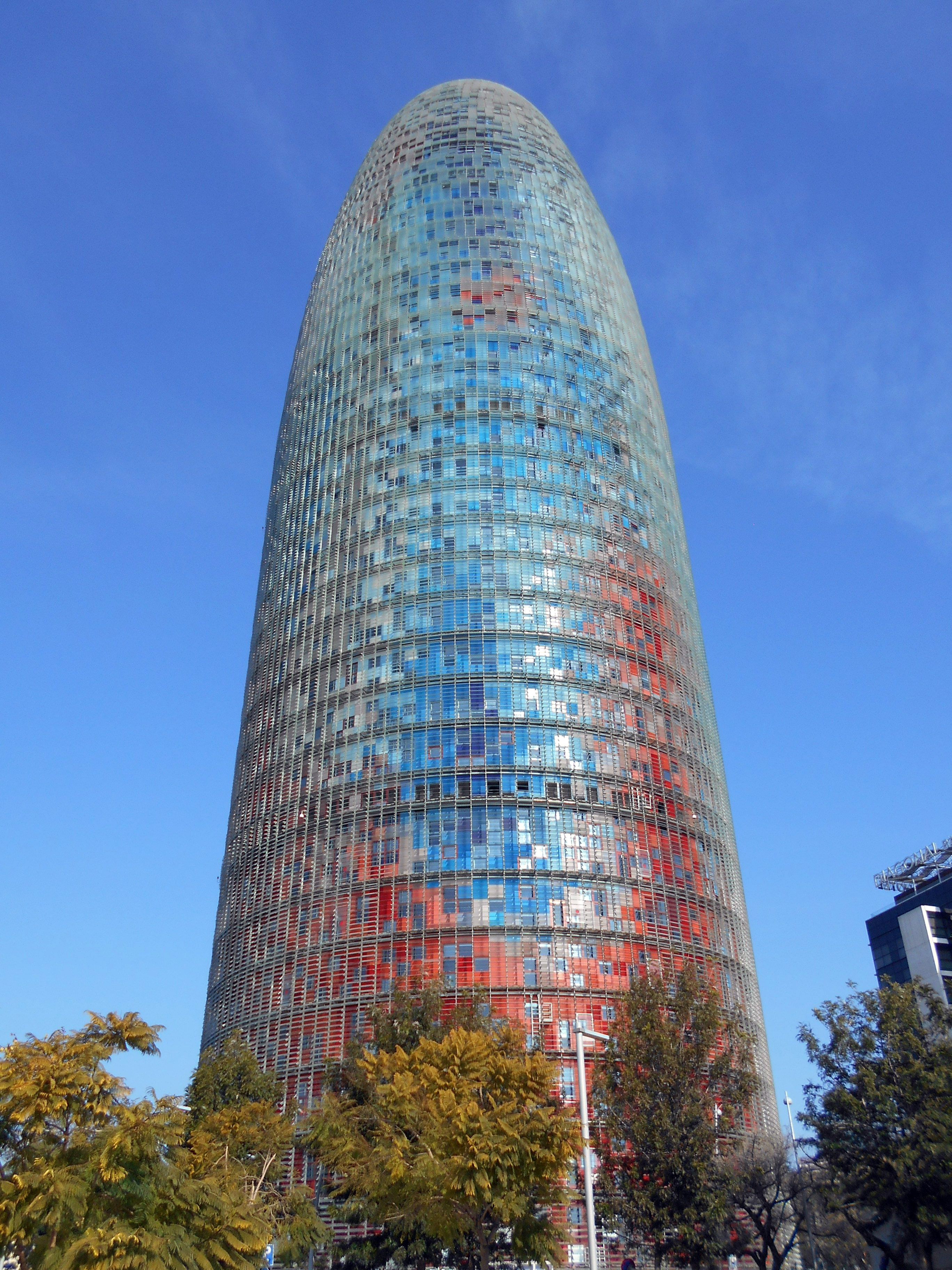 Torre Agbar.